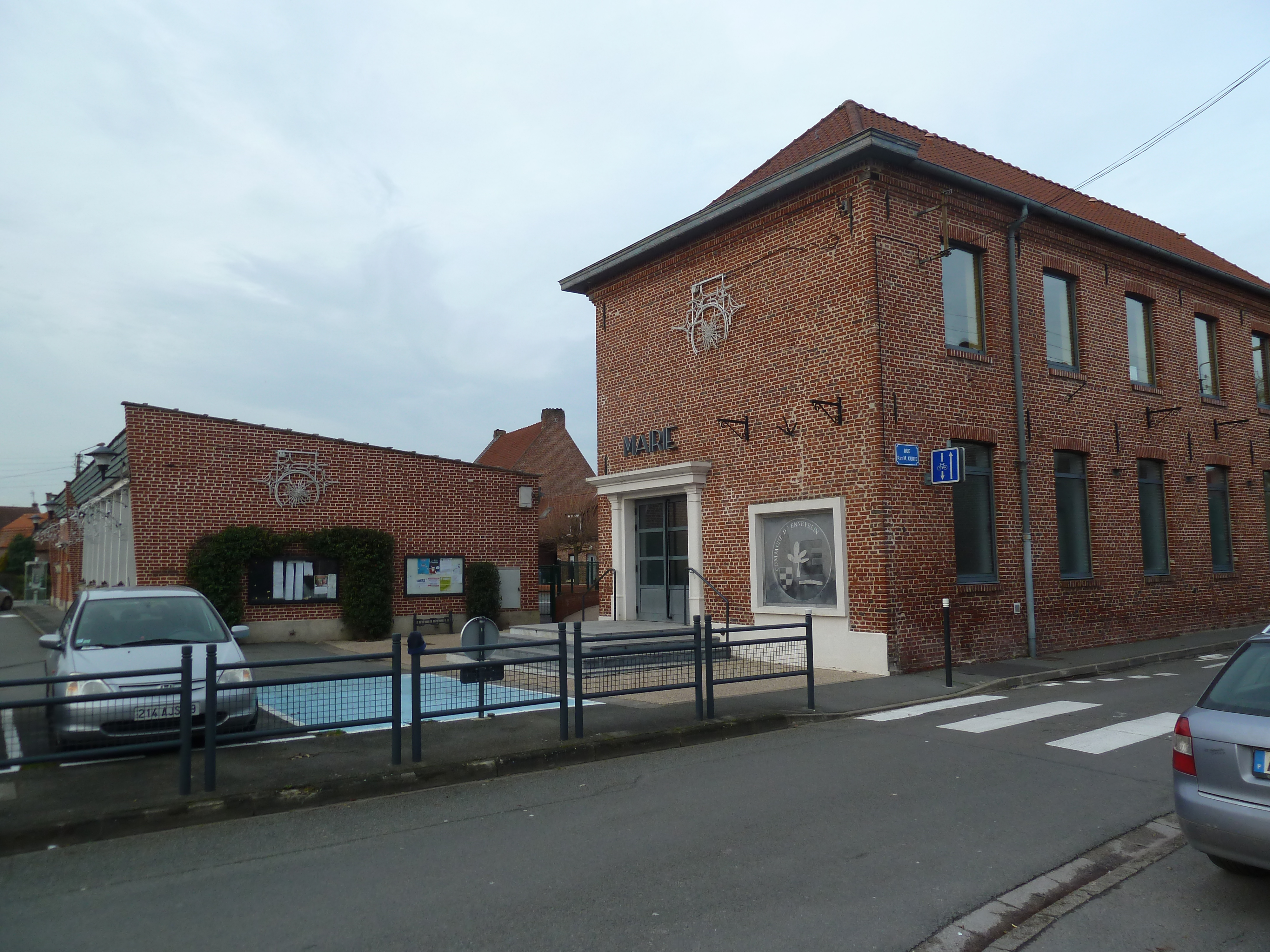 la mairie Ennevelin Nord.-France